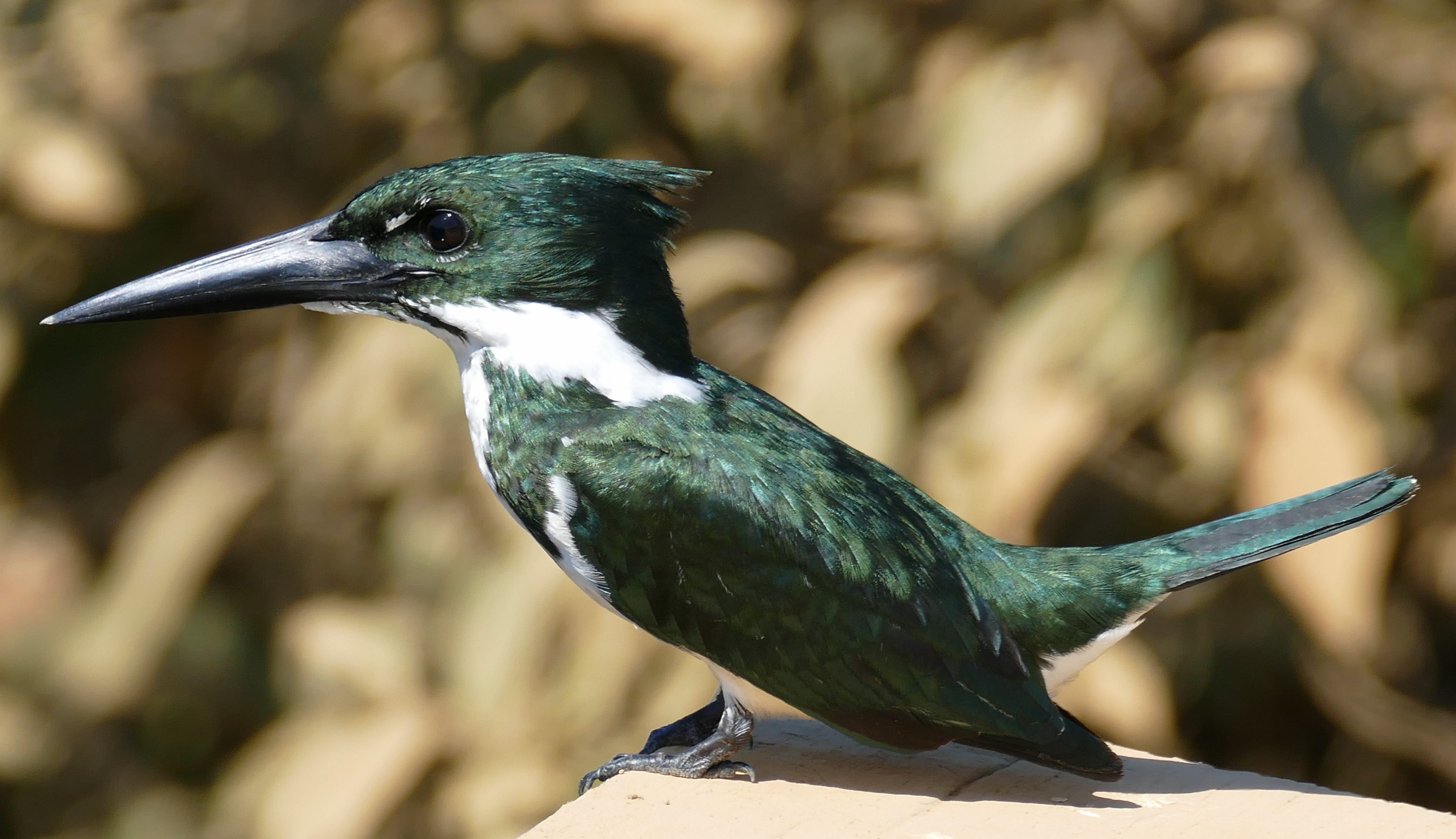 Transpantaneira, Poconé, Mato Grosso, BRAZIL